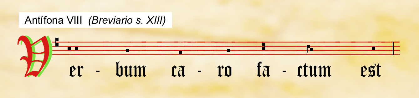 Antífona: Verbum caro, fragmento de Breviario del s. XII, Archivo Capitular de la Catedral de Ourense (España); Copia moderna.